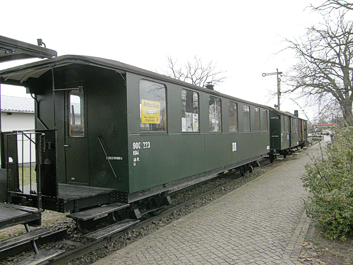 sächsischer Schmalspurpersonenwagen, für den Einsatz im Spreewaldbahnnetz auf Meterspur umgespurt. Auffällige Unterschiede zur Ursprungsbauart sind die Radsätze mit größerem Raddurchmesser und die deshalb notwendigen zusätzlichen Trittstufen.